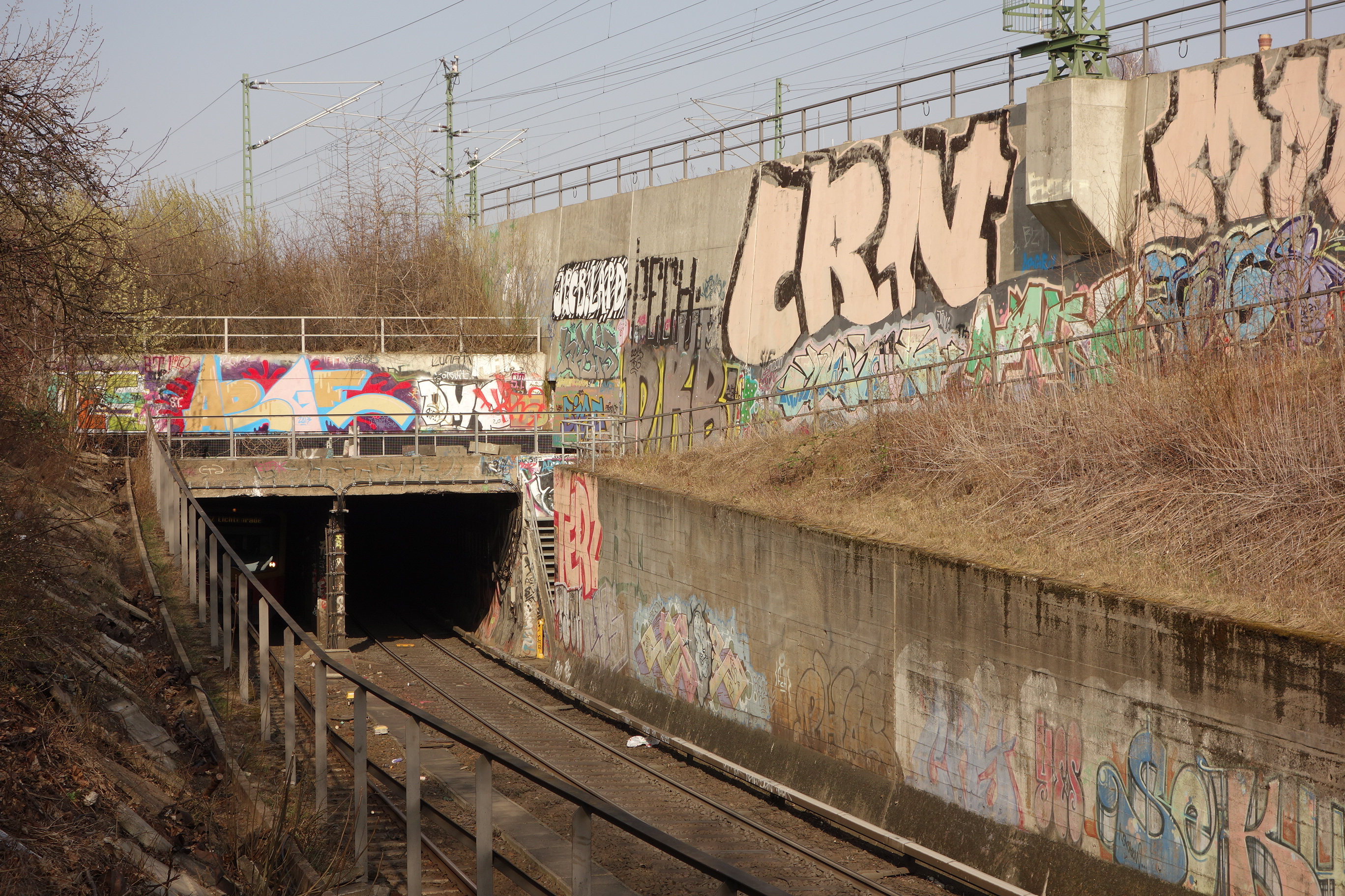 Nord-Süd-Tunnel der S-Bahn Berlin, Portal Süd (S2), oben die Nord-Süd-Fernbahn